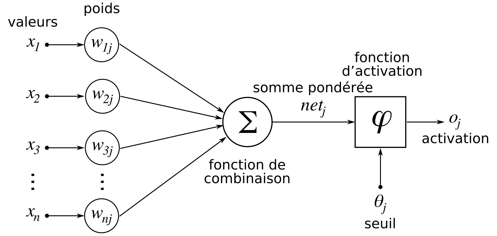 Voix schématique d'un neurone artificiel avec un index j.